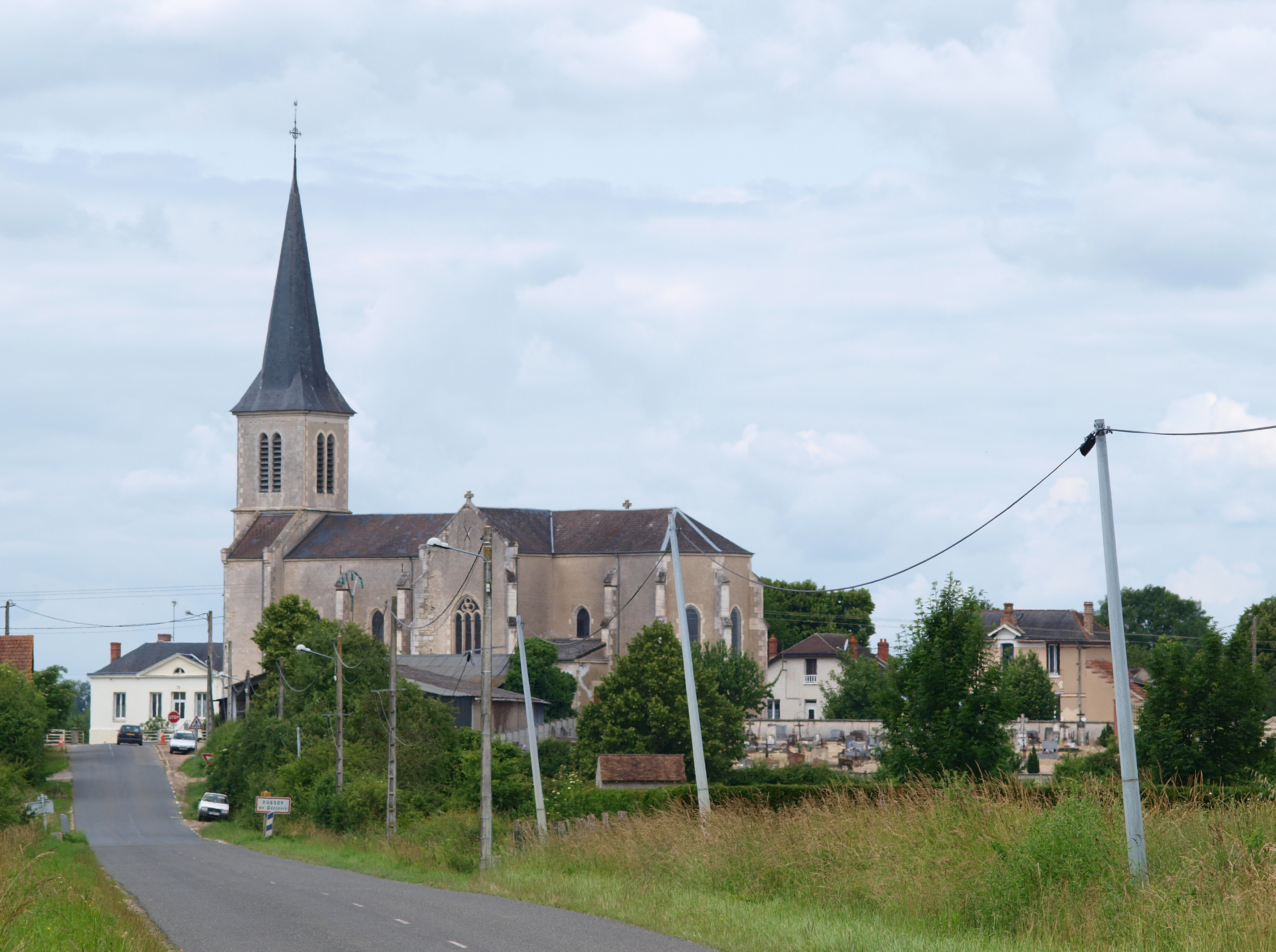 Oussoy-en-Gâtinais (Loiret, France)